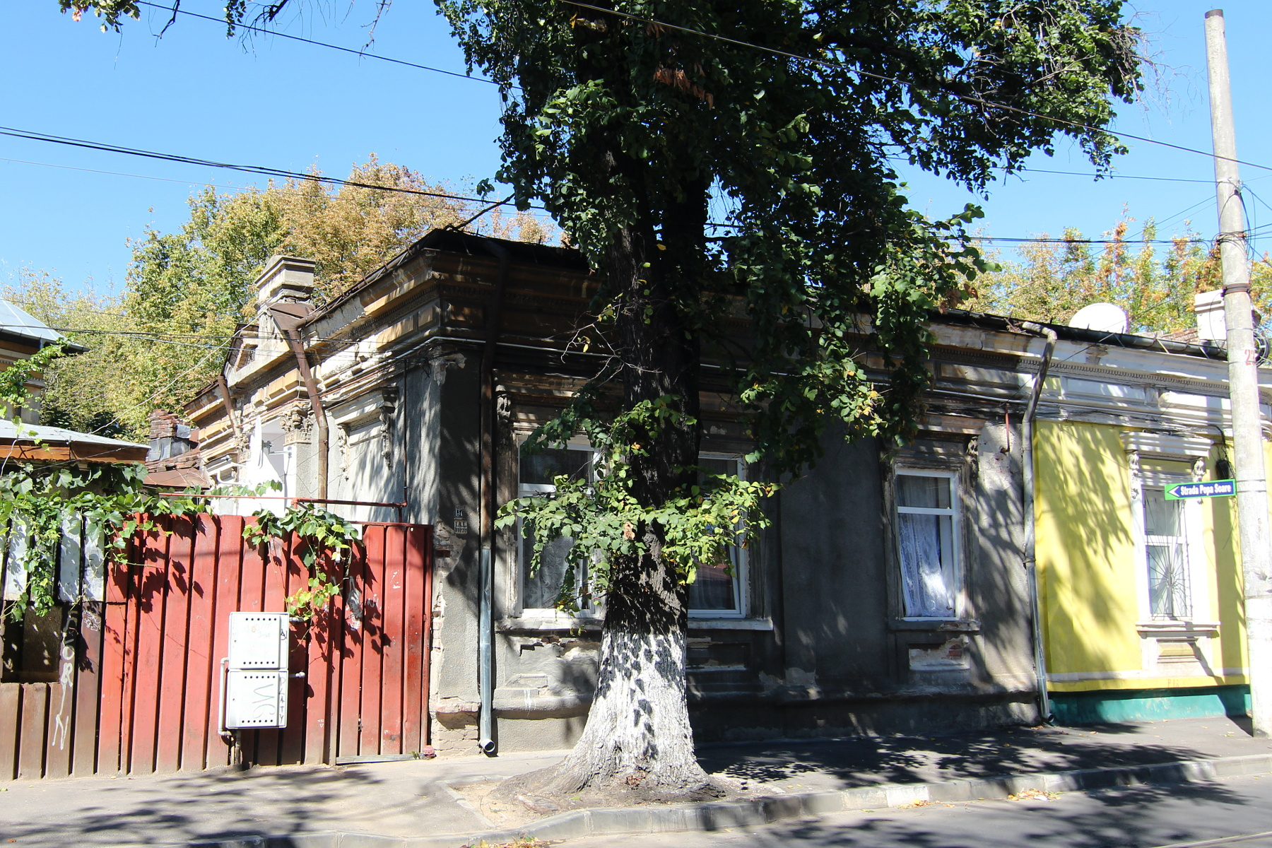 Casă pe strada Traian